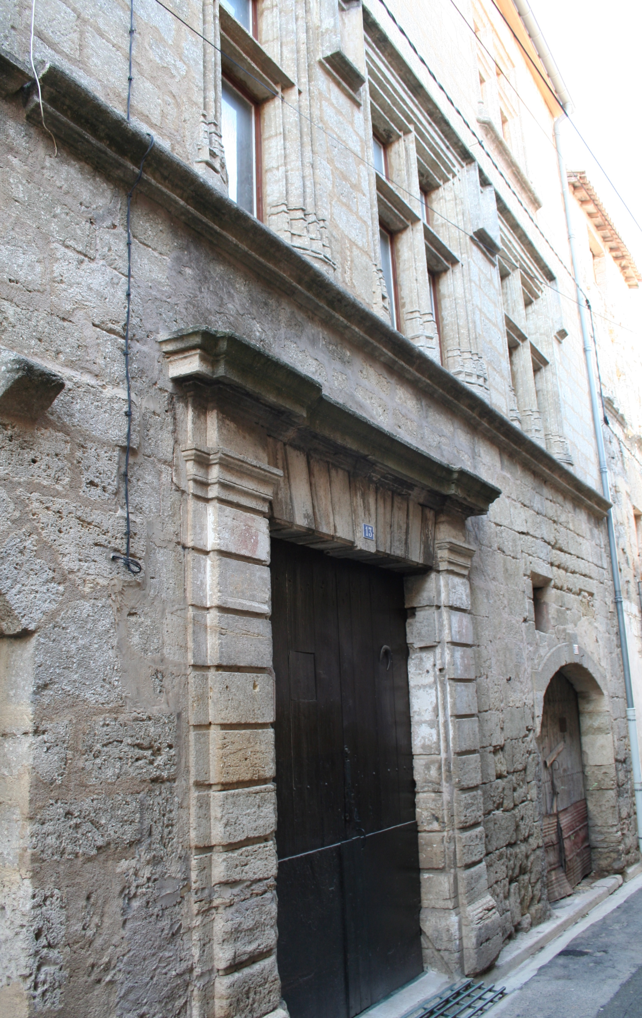 Montagnac (Hérault) - Hôtel de Pegat - vue 1.